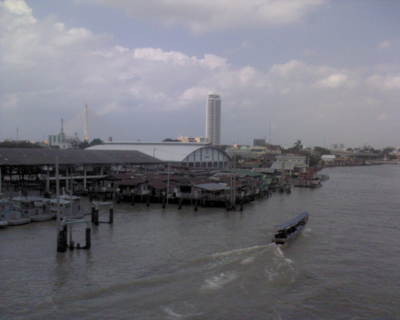 national museum of royal barges (พิพิธภัณฑสถานแห่งชาติ เรือพระราชพิธี) ,Bangkok, Thailand